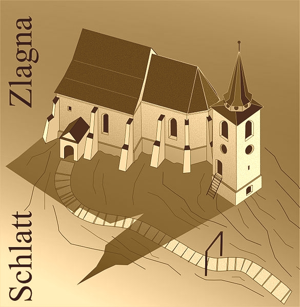 Biserica fortificata din Zlagna SEPIA.